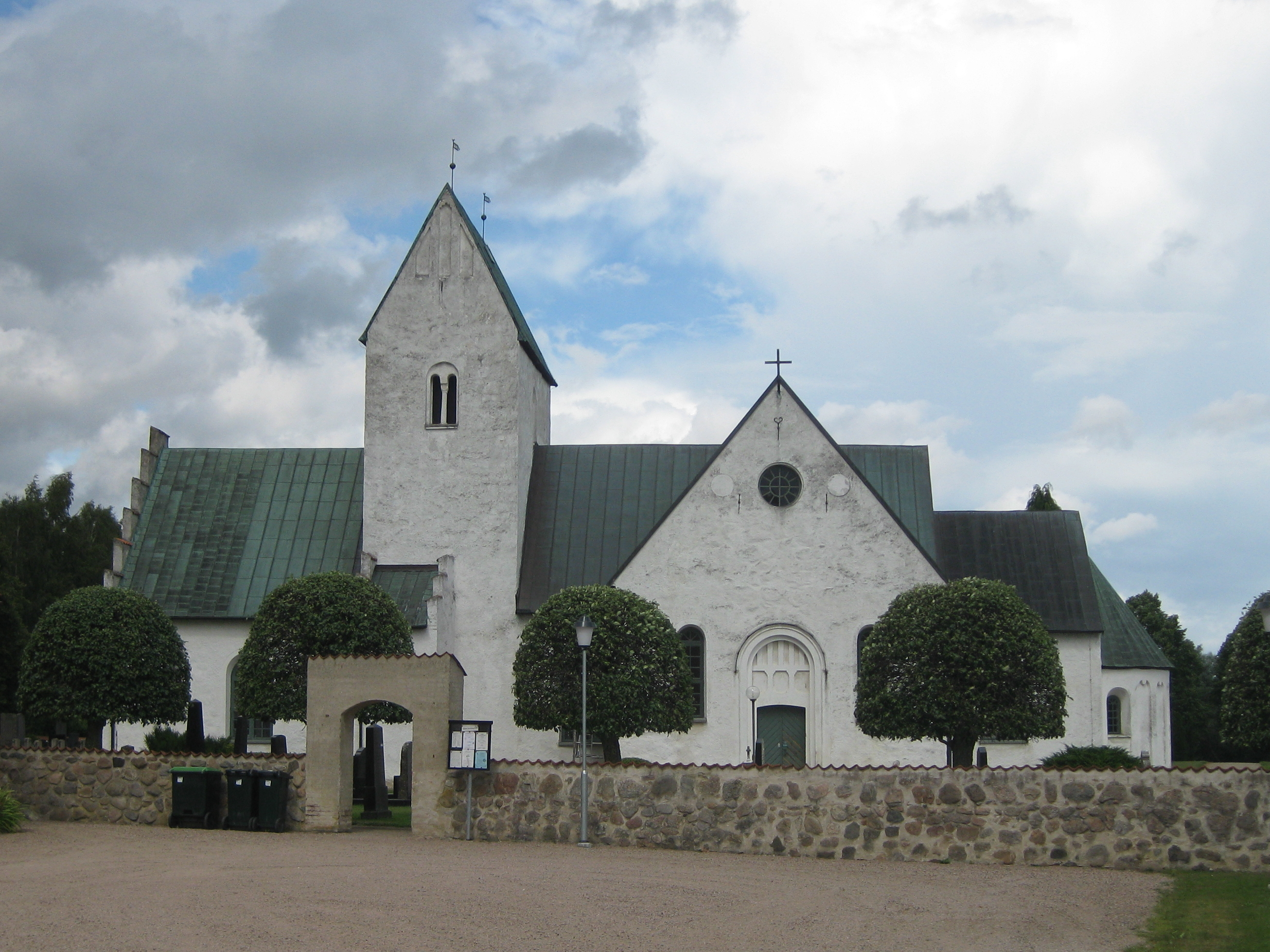 Köpinge kyrka Gärds köpinge i Kristianstads kommun, Skåne